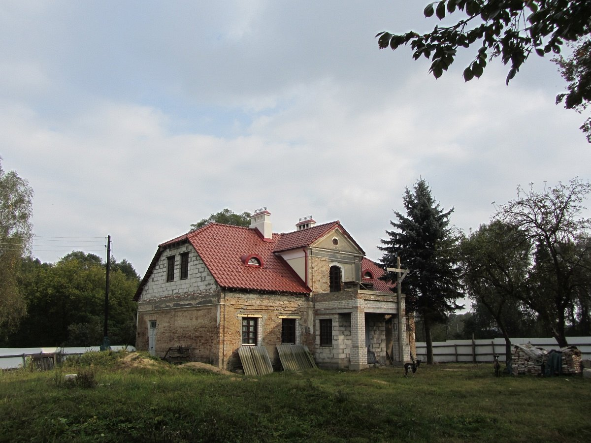 Краявіды Воўчына